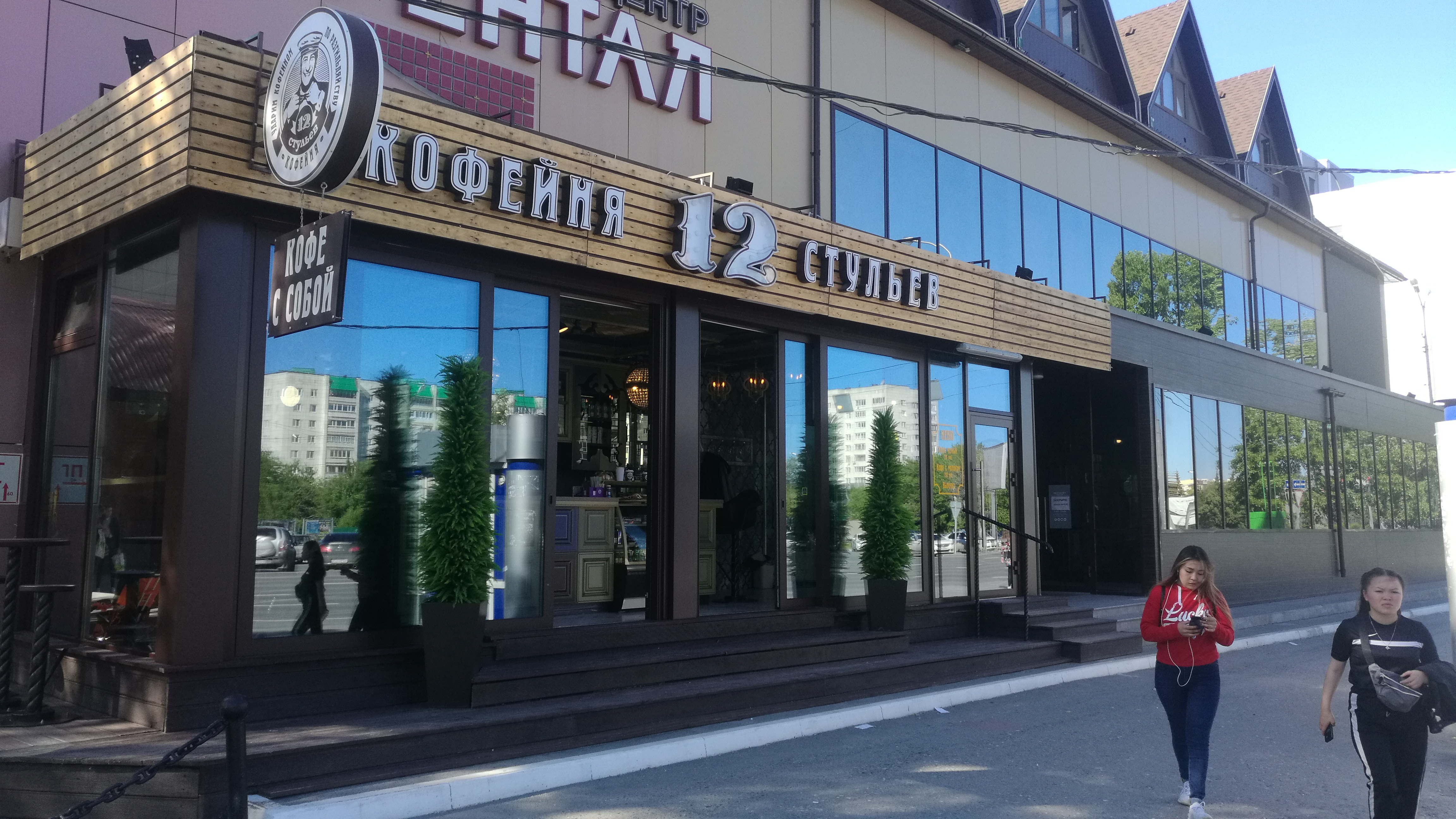 Kafejo 12 seĝoj. Tjumeno, Rusio.